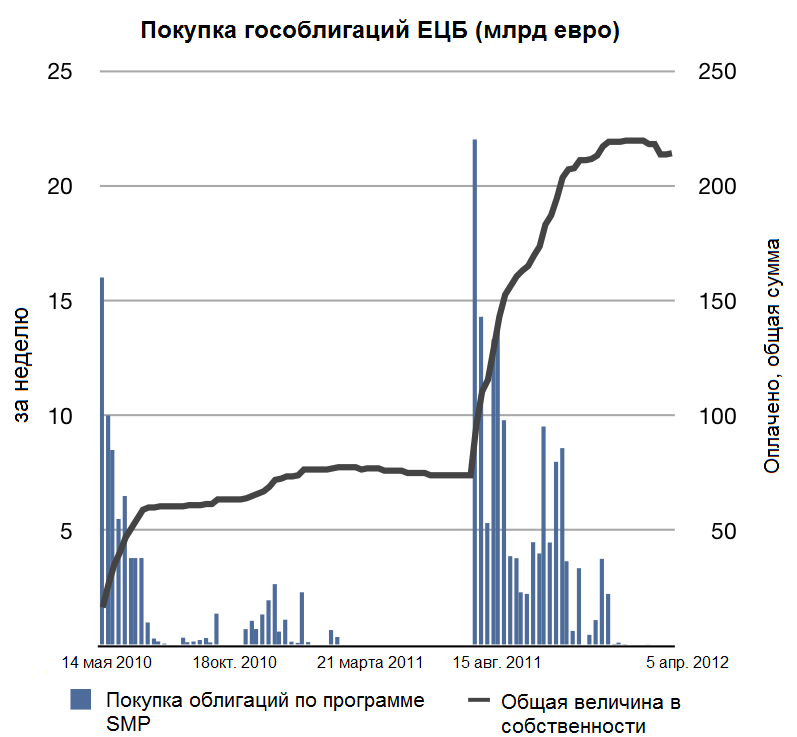 Еженедельные объёмы закупок гособлигаций по программе торговли на рынках ценных бумаг ЕЦБ (ECB Securities Markets Program, SMP) и общая сумма оплаченных облигаций, с мая 2010 по февраль 2012 г. Источник